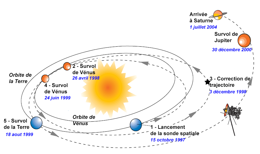 Transit de Cassini-Huygens vers Saturne (légende en francais)